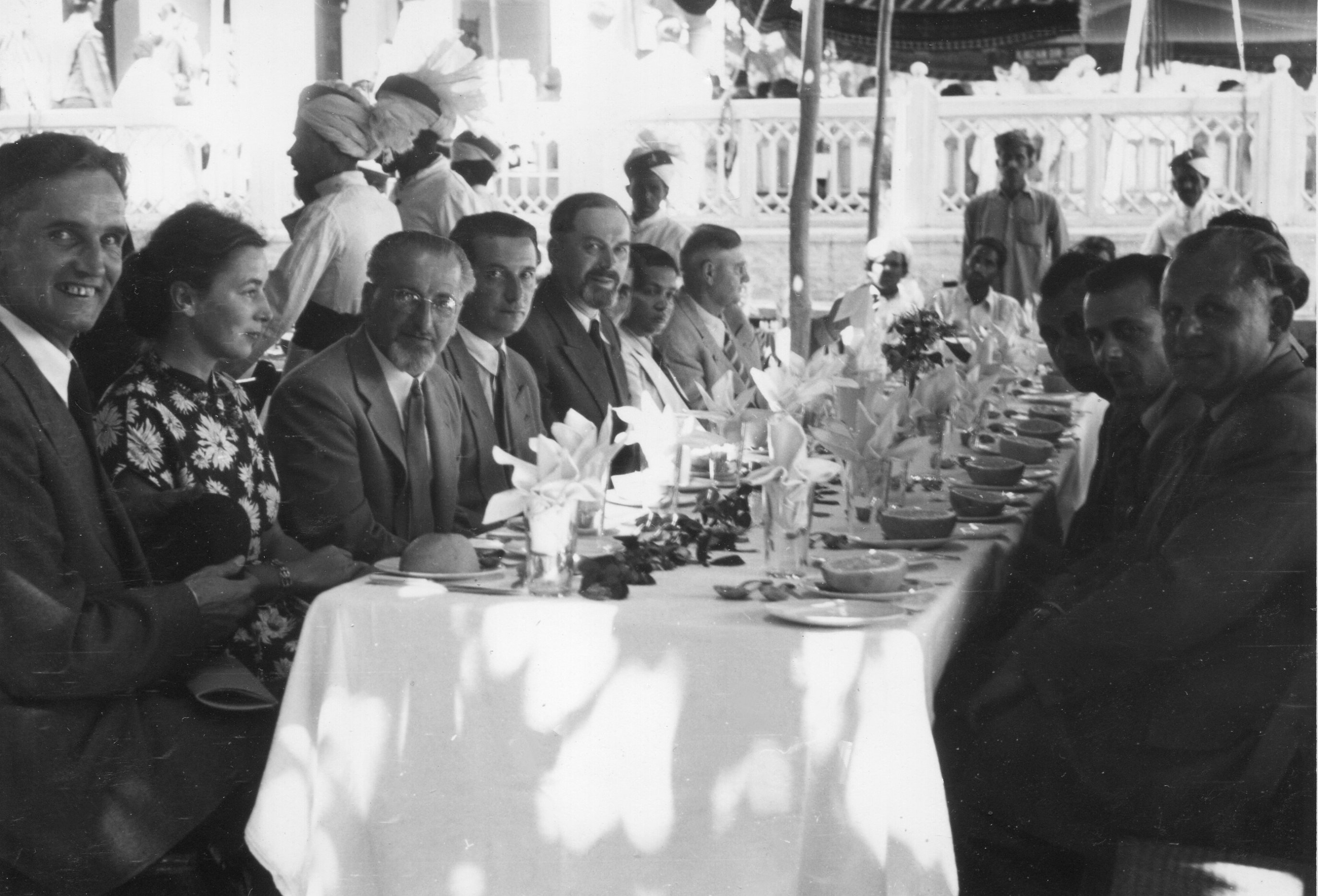 Deutsche Gäste (Krupp Rohstoffe, Essen) des Pakistanischen Industrieministers in Quetta / Westpakistan